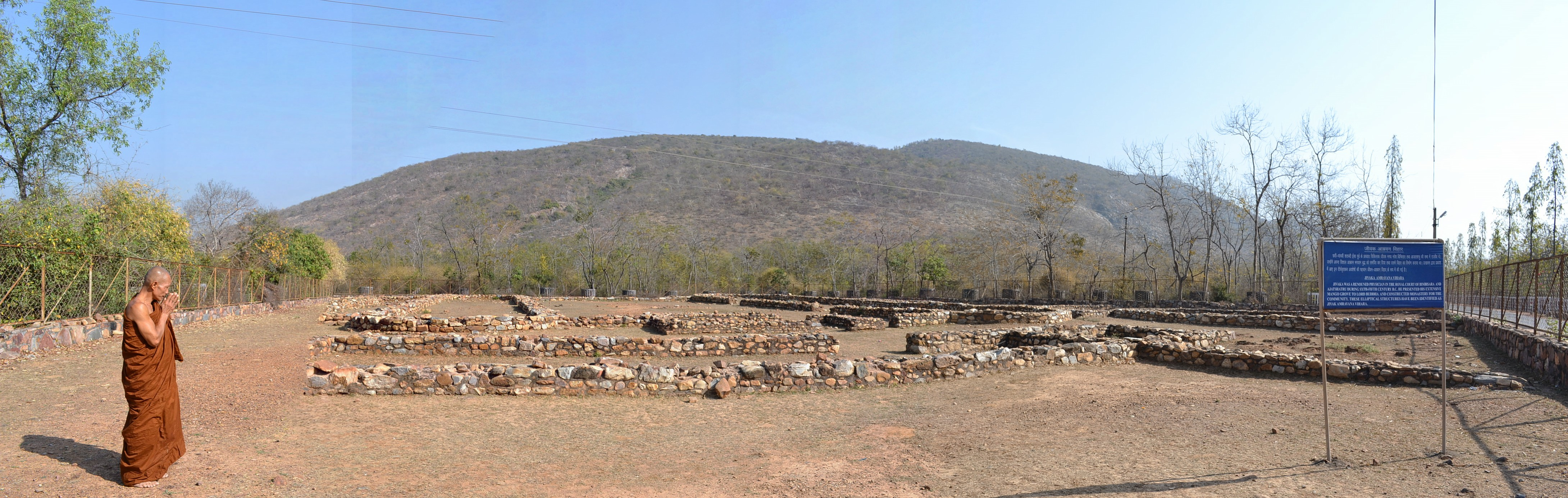 ชีวกัมพวัน อารามของท่านหมอชีวกโกมารภัจจ์ บรมครูแห่งการแพทย์แผนโบราณ (แพทย์แผนไทย)ถ่ายที่: ราชคฤห์ ประเทศอินเดีย Remains of Jivakambavana, the monastery donated by Doctor Jivaka to the Sangha, so that Buddha and other monks might stay there when they were sick and needed treatment by him. Located at Rajgir, Bihar, India.